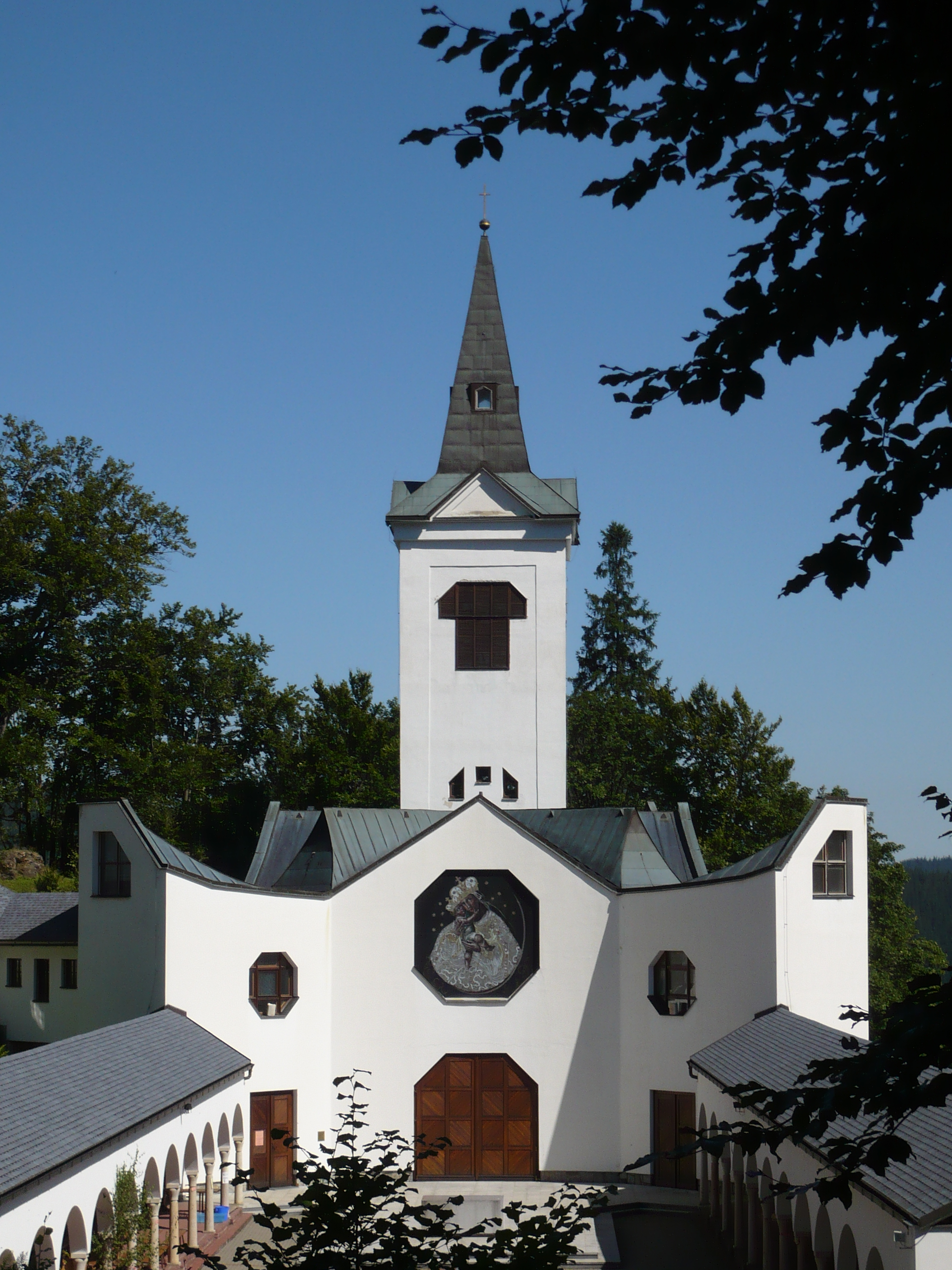 Poutní kostel Panny Marie Pomocné, Zlaté Hory